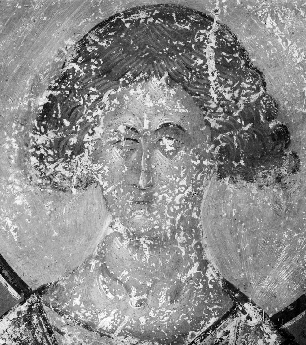 Фрагмент фрески Успенского собора на Городке в Звенигороде. Около 1399 года.